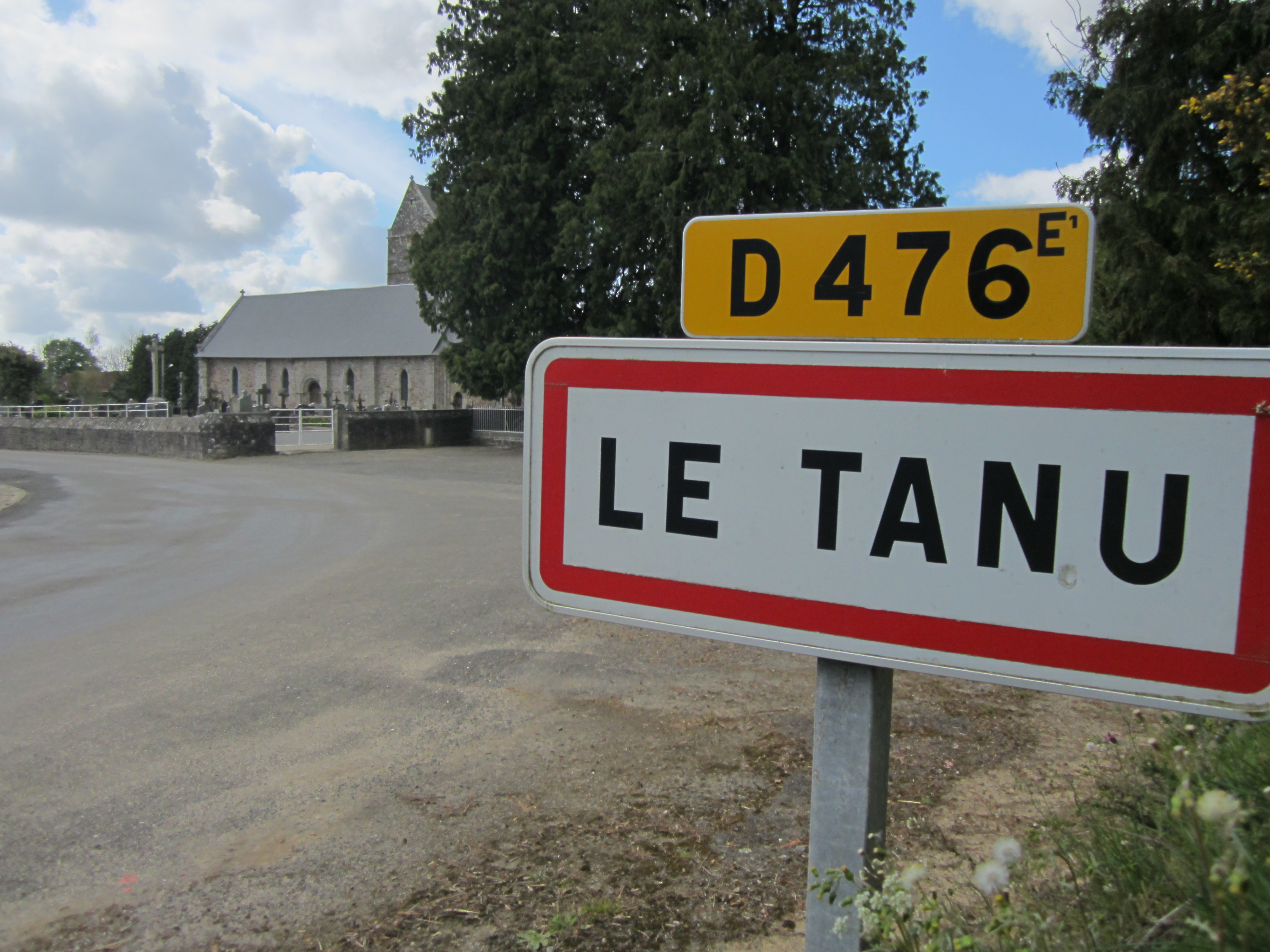 Le Tanu, Manche